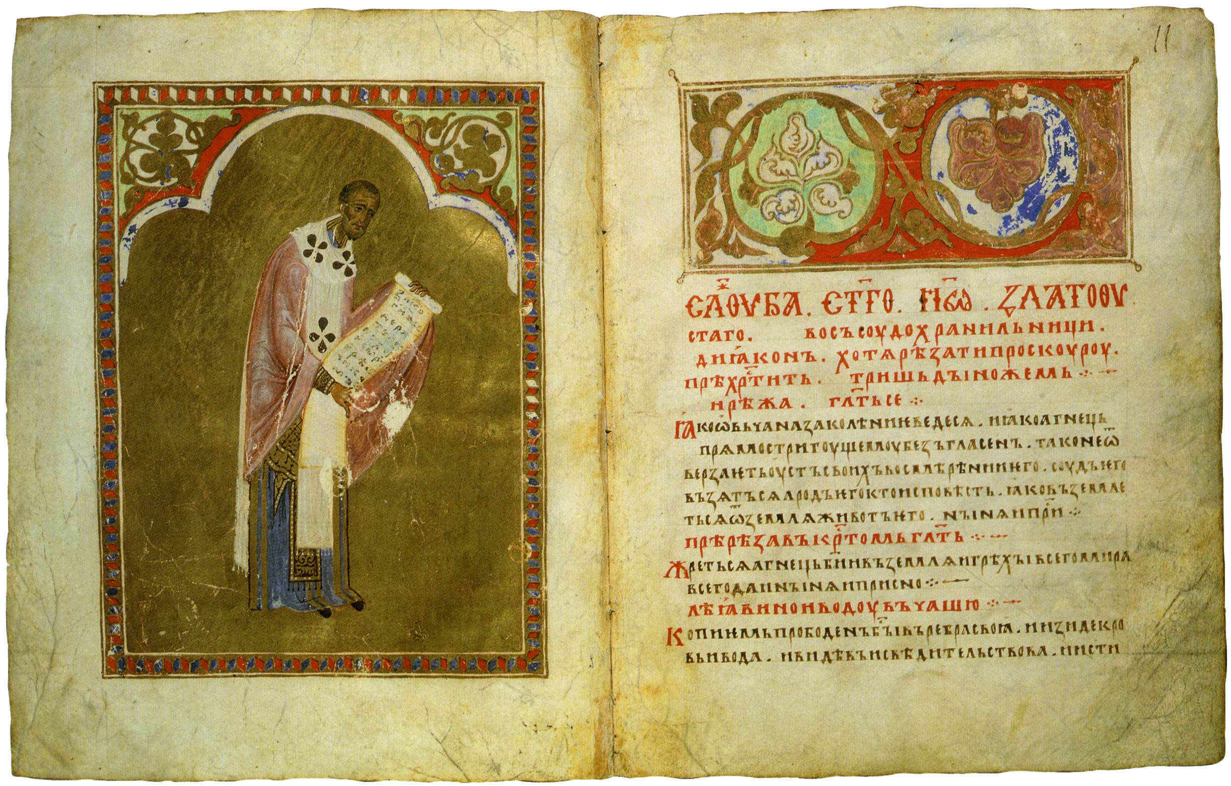 Хутынскі служэбнік. Аркушы 10 (адварот) — 11. Канец XII — пачатак XIII стст. Дзяржаўны гістарычны музей, Масква.